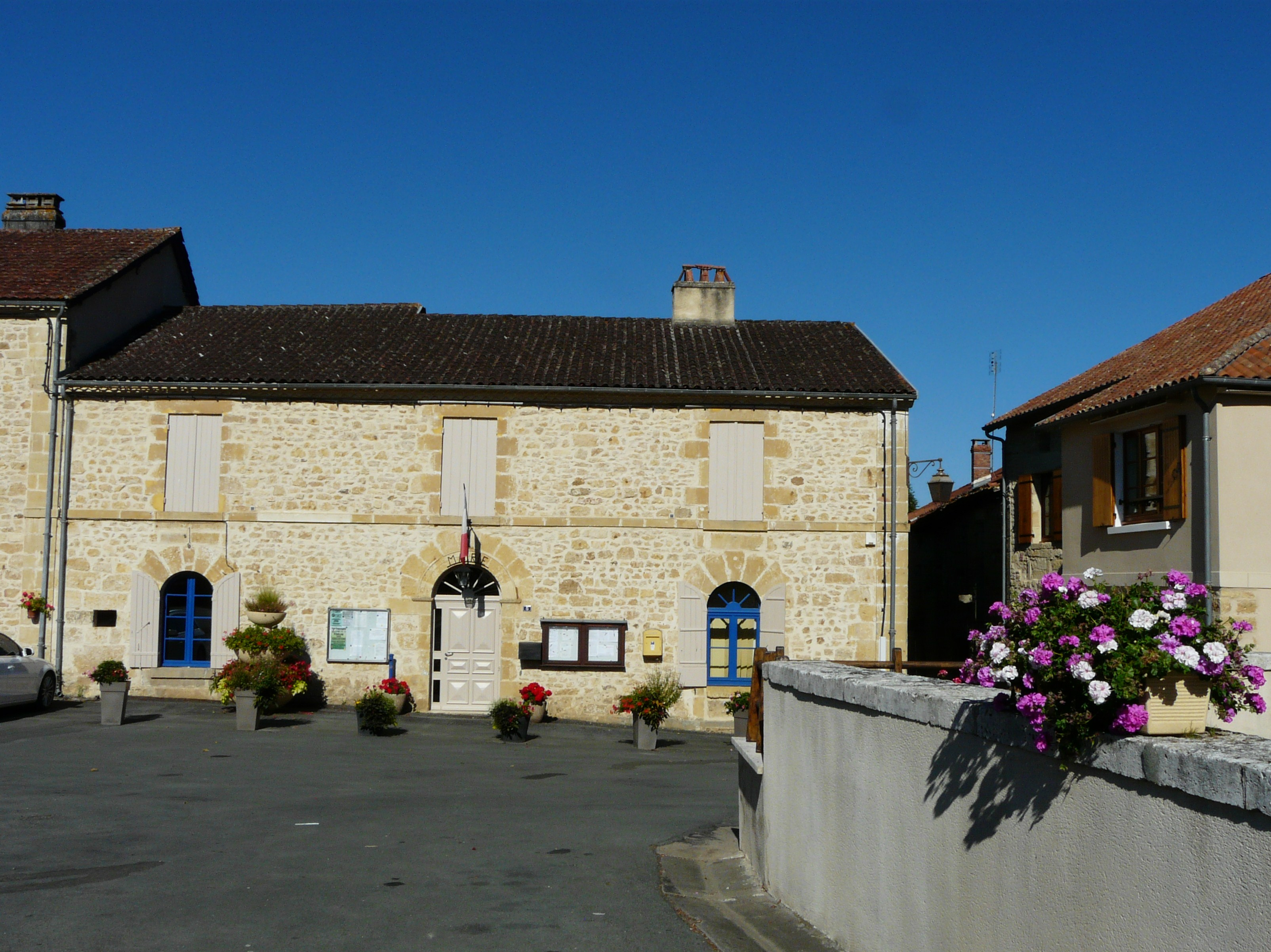 La mairie de Nantheuil, Dordogne, France.